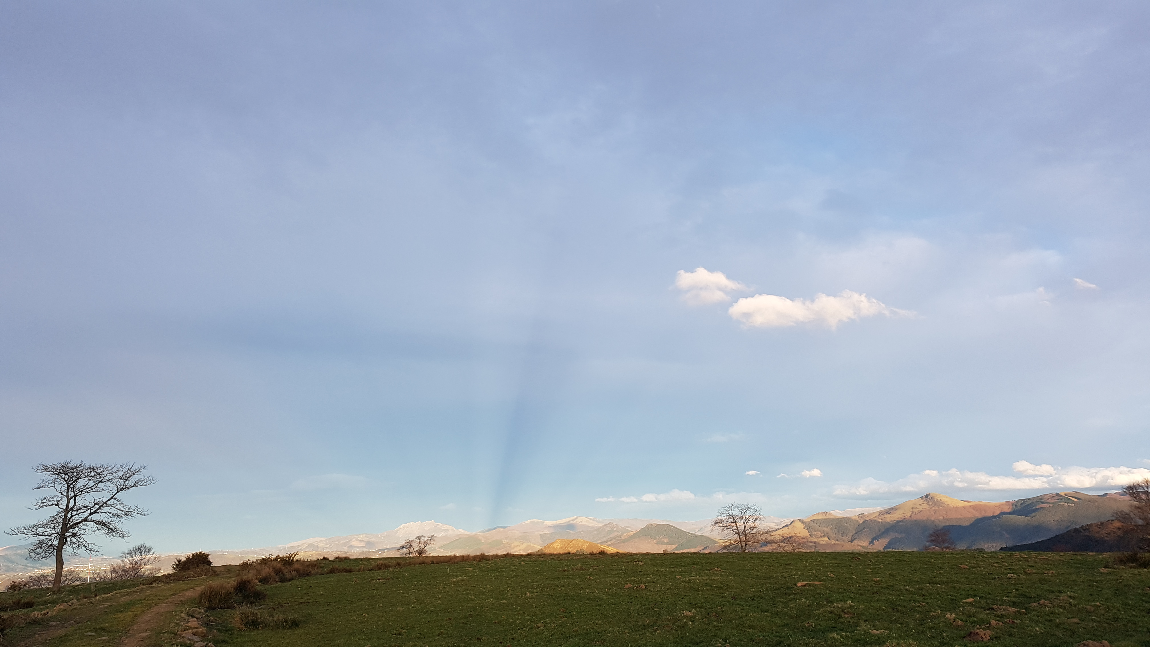 Izpi antikrepuskularrak Zizurkilgo Ezkeltzu menditik. Izpiek Aiako Harriaren eskuinean bat egiten dutela dirudi.